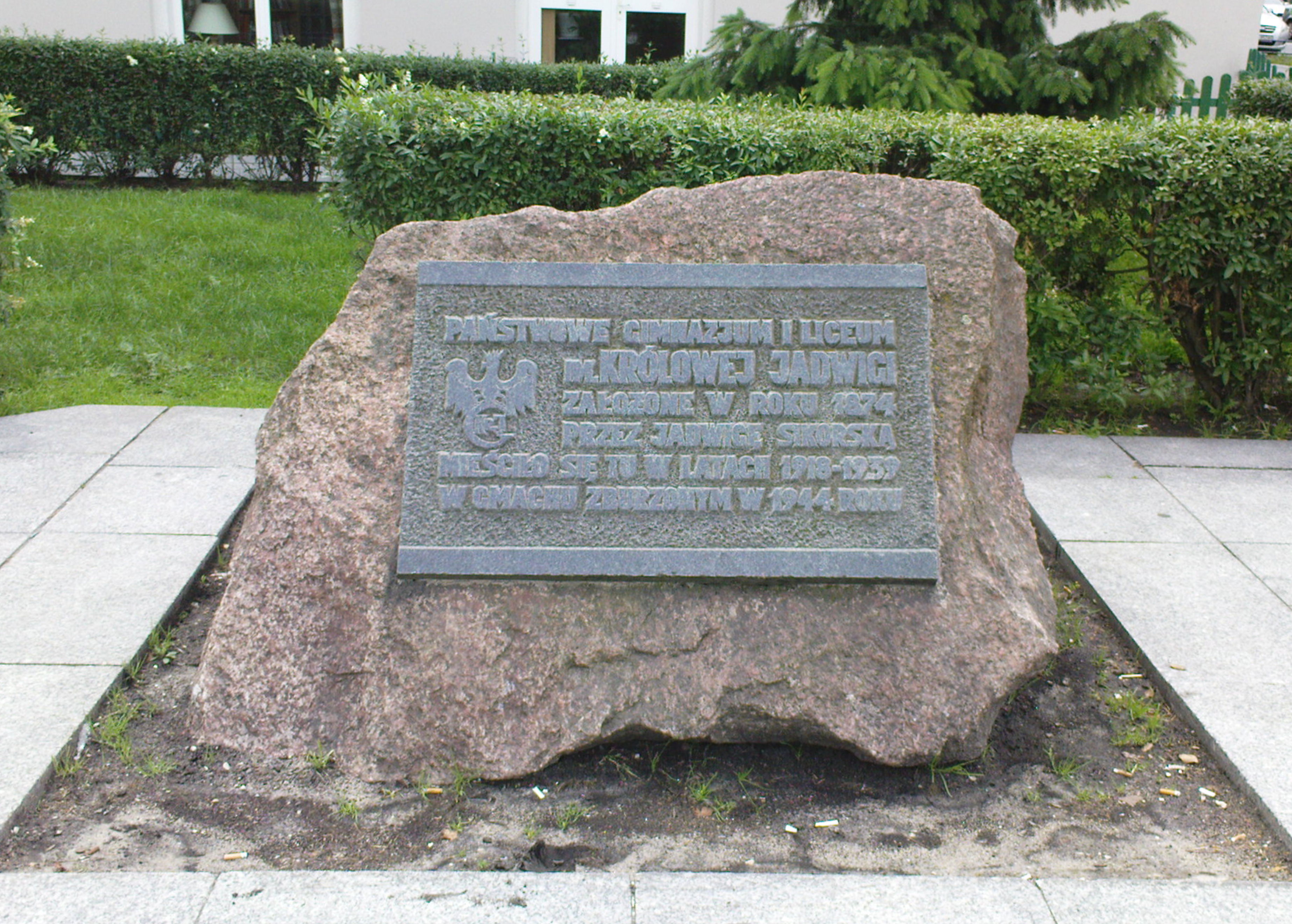 Kamień upamiętniający miejsce lokalizacji liceum i gimnazjum im Królowej Jadwigi w latach 1918 - 1939, zburzone w 1944r